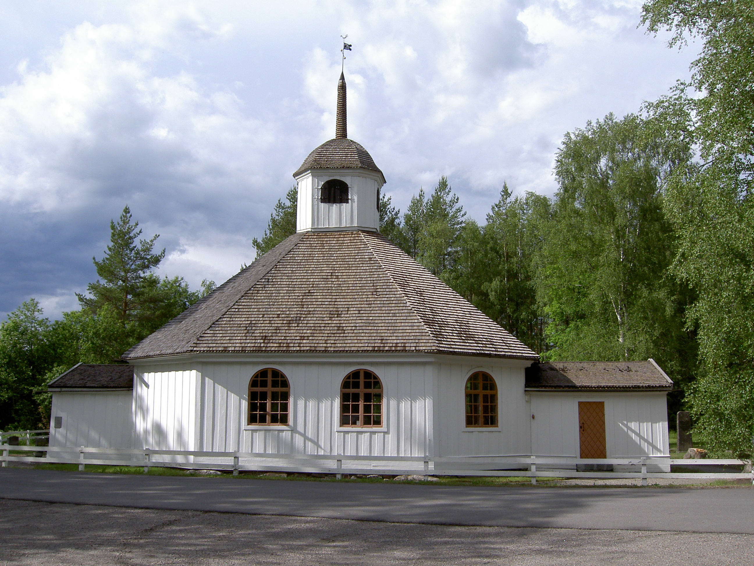 Lögdö Bruks kyrka